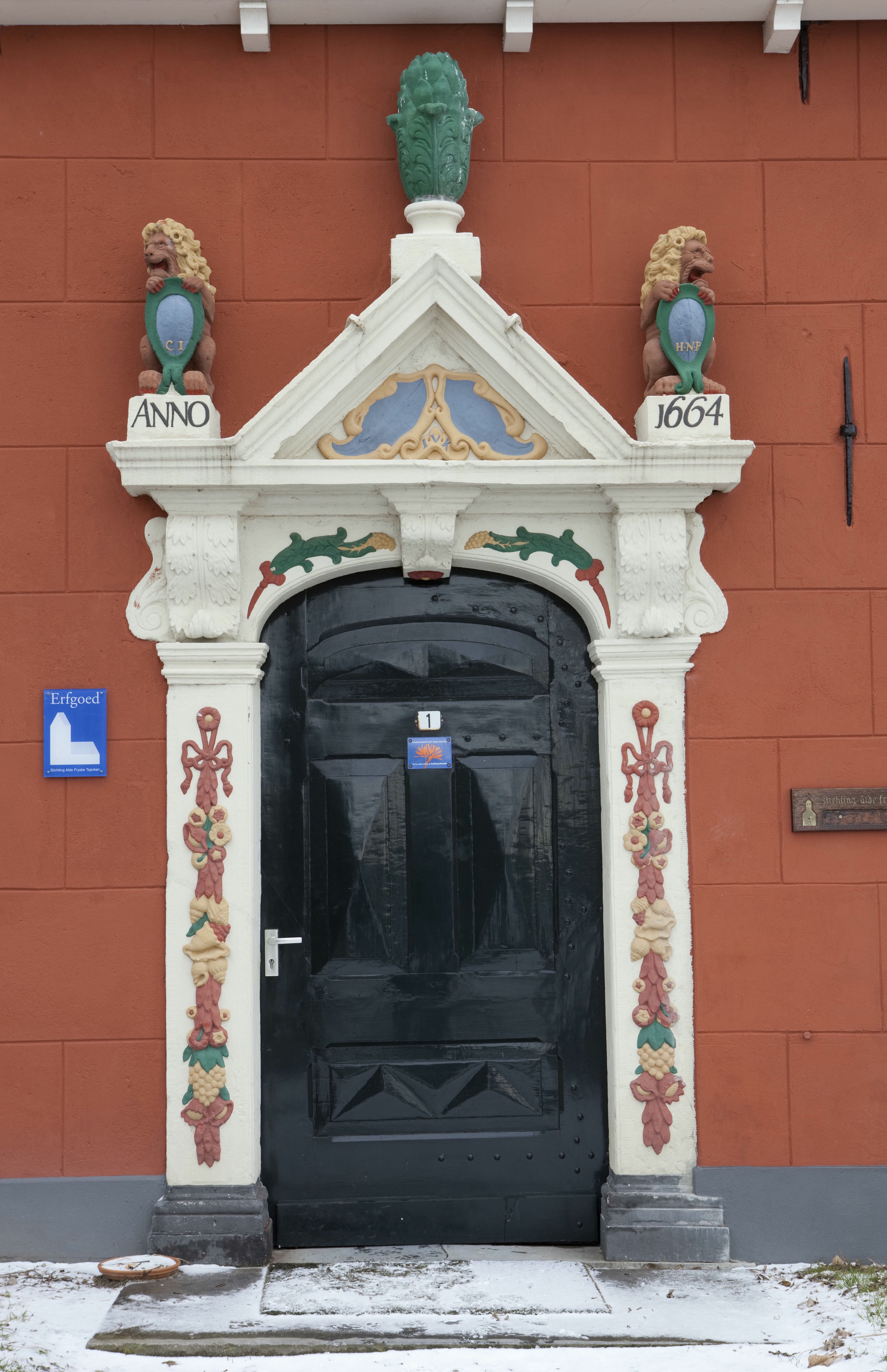 Nederlands Hervormde Kerk: Overzicht van het ingangsportaal in de zuidgevel